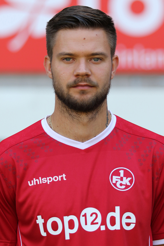 Lukas Spalvis